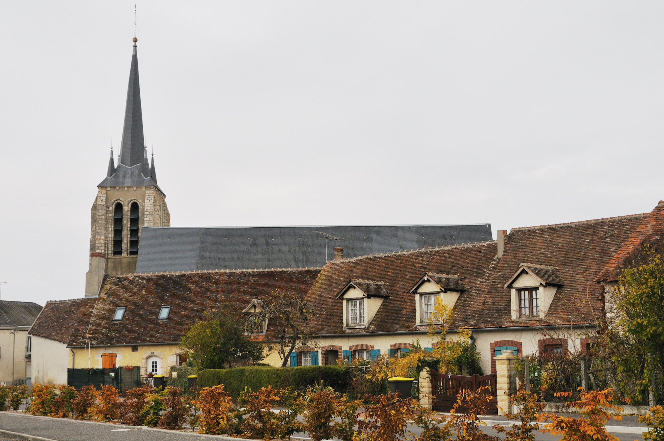 Église Saint-Pierre de Vimory, Loiret, France